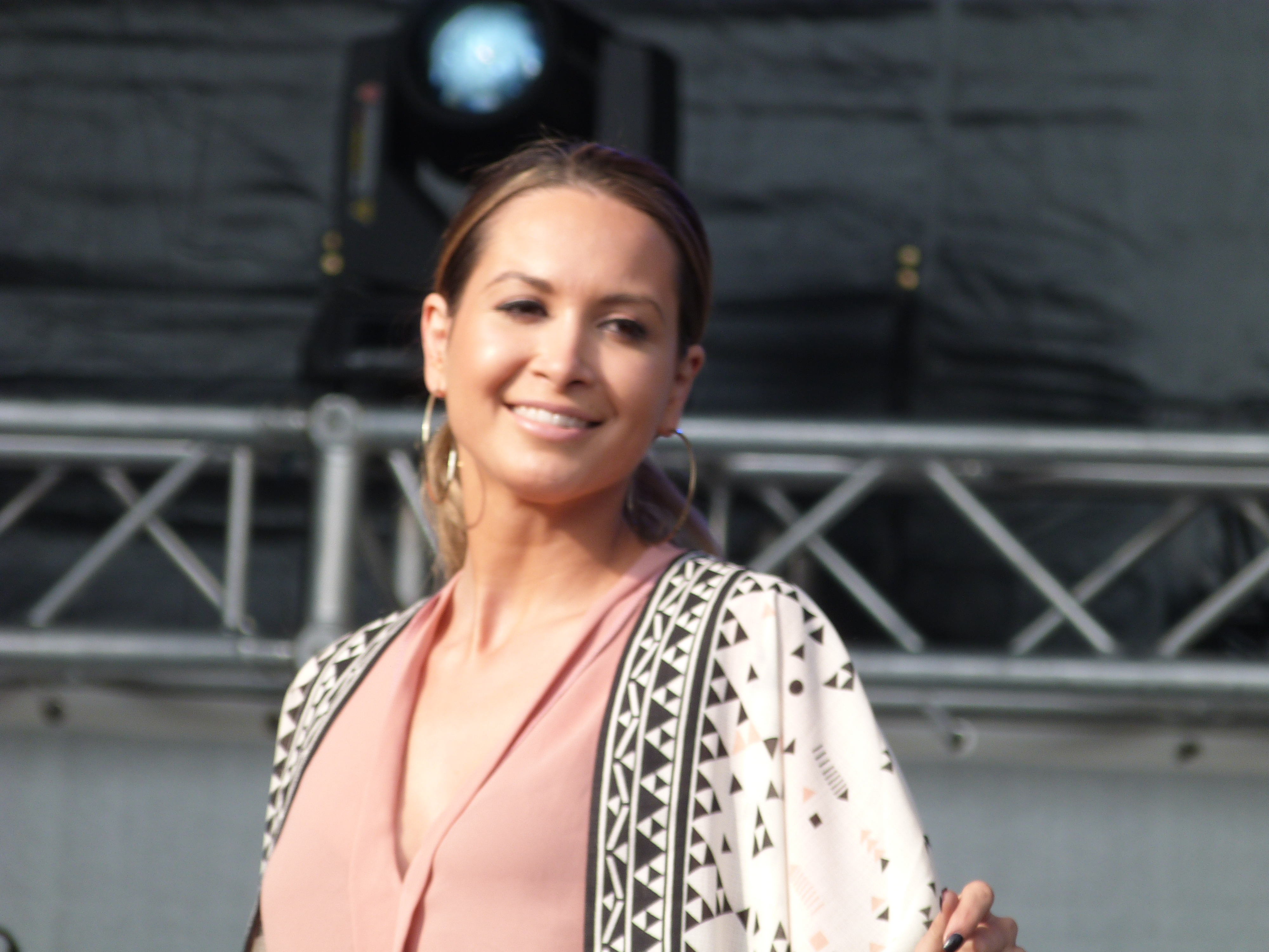 Mandy Capristo beim Rsh-Kindertag am 16.09.2012